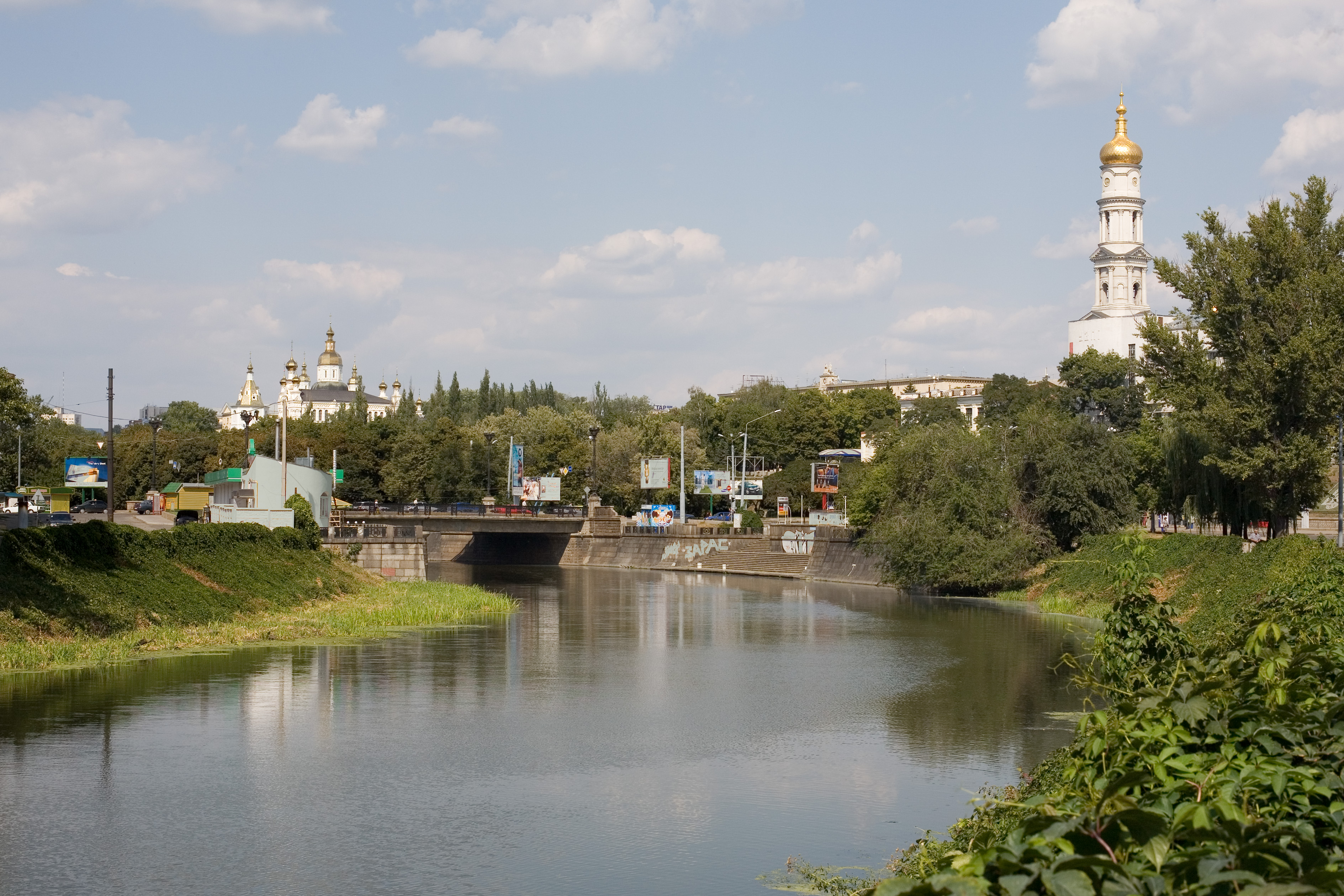 Lopan River & 2 Cathedrals (Kharkov). Река Лопань. Впереди Большой Лопанский мост. Слева Покровский монастырь, справа колокольня Успенского собора.